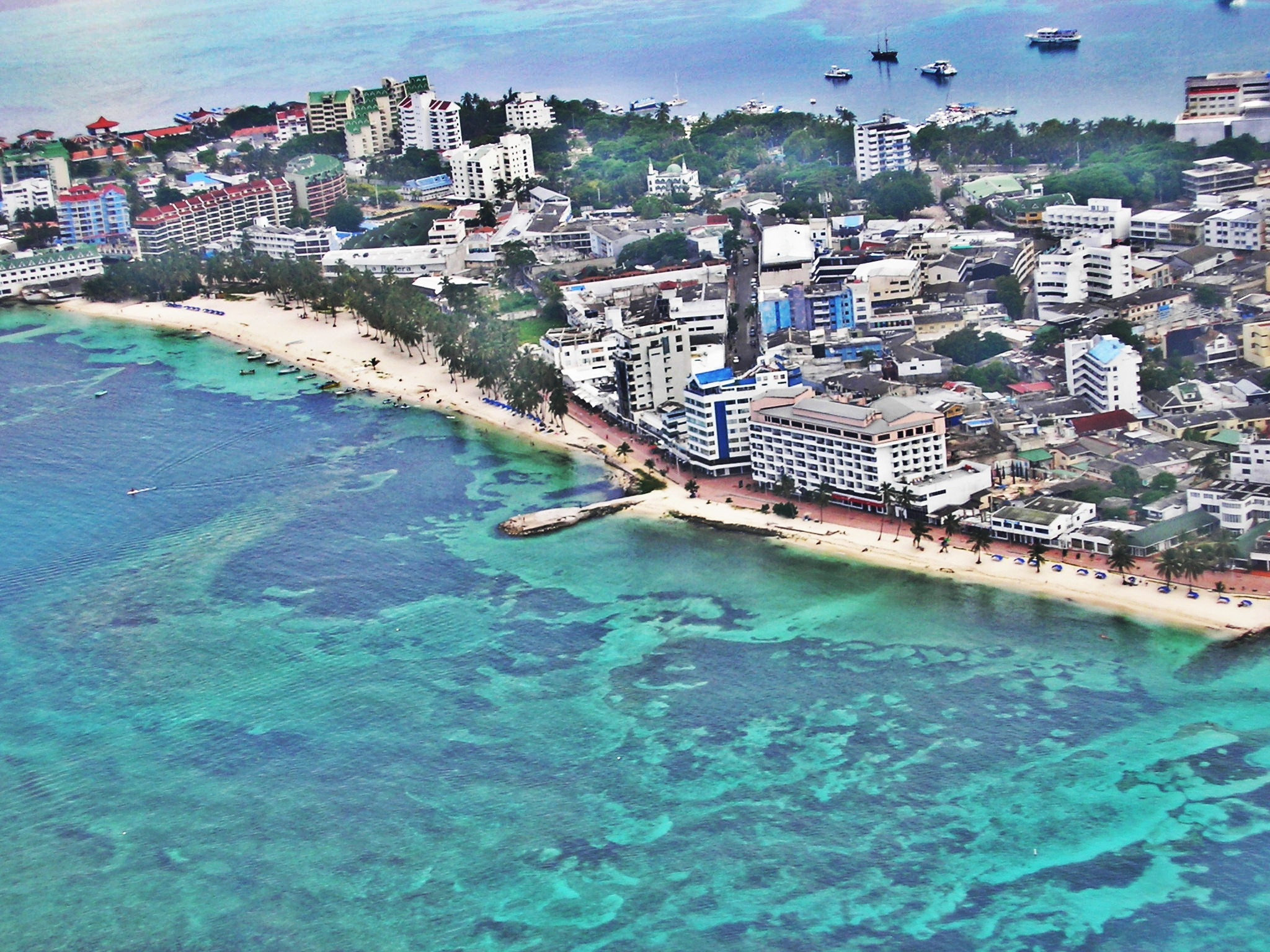 Panorama de San Andrés Isla, Colombia